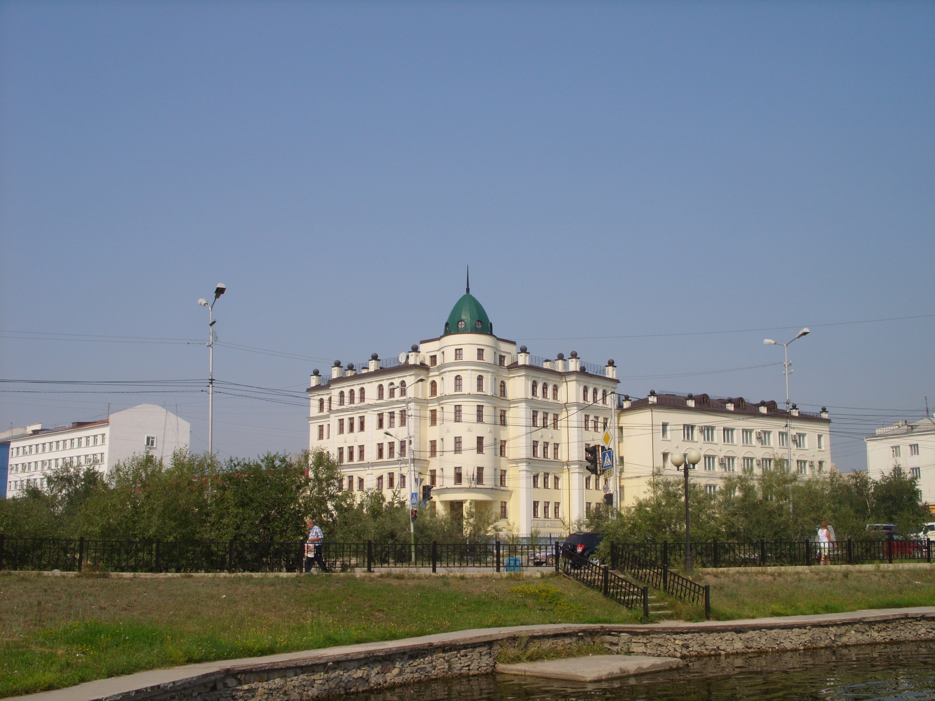 на углу пр. Ленина и ул. Кулаковского